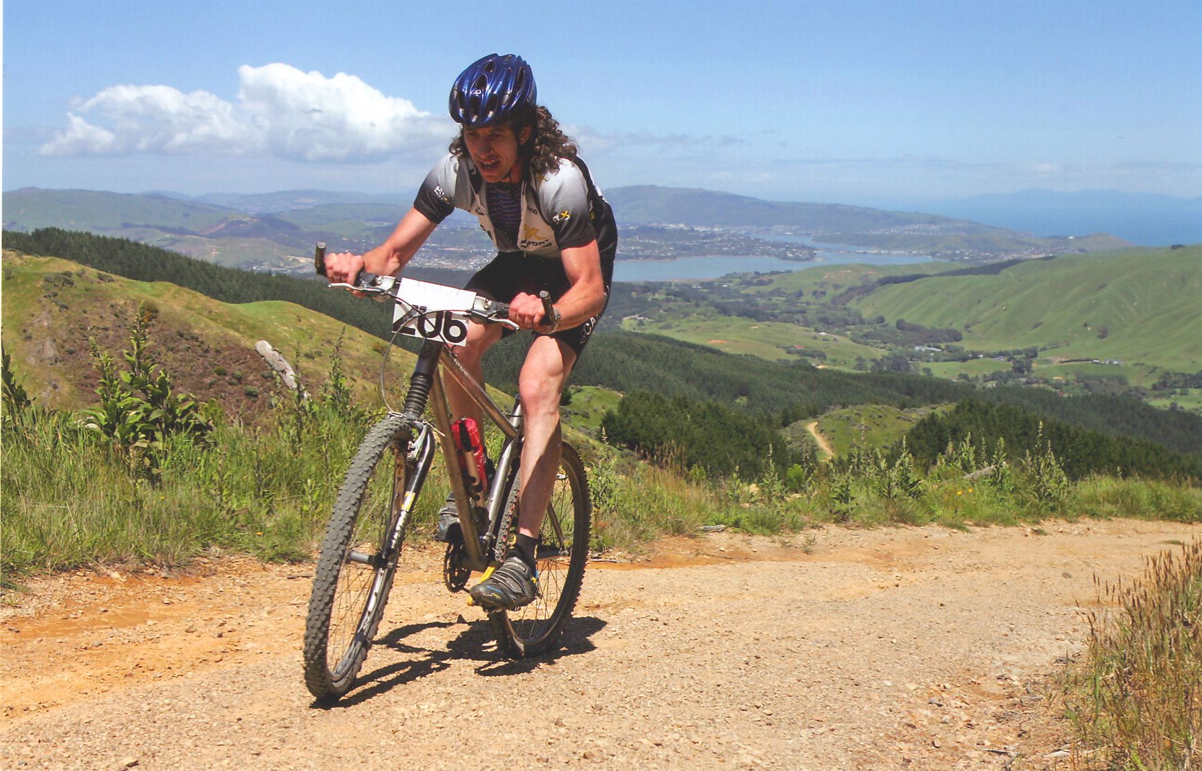 race 5_pete